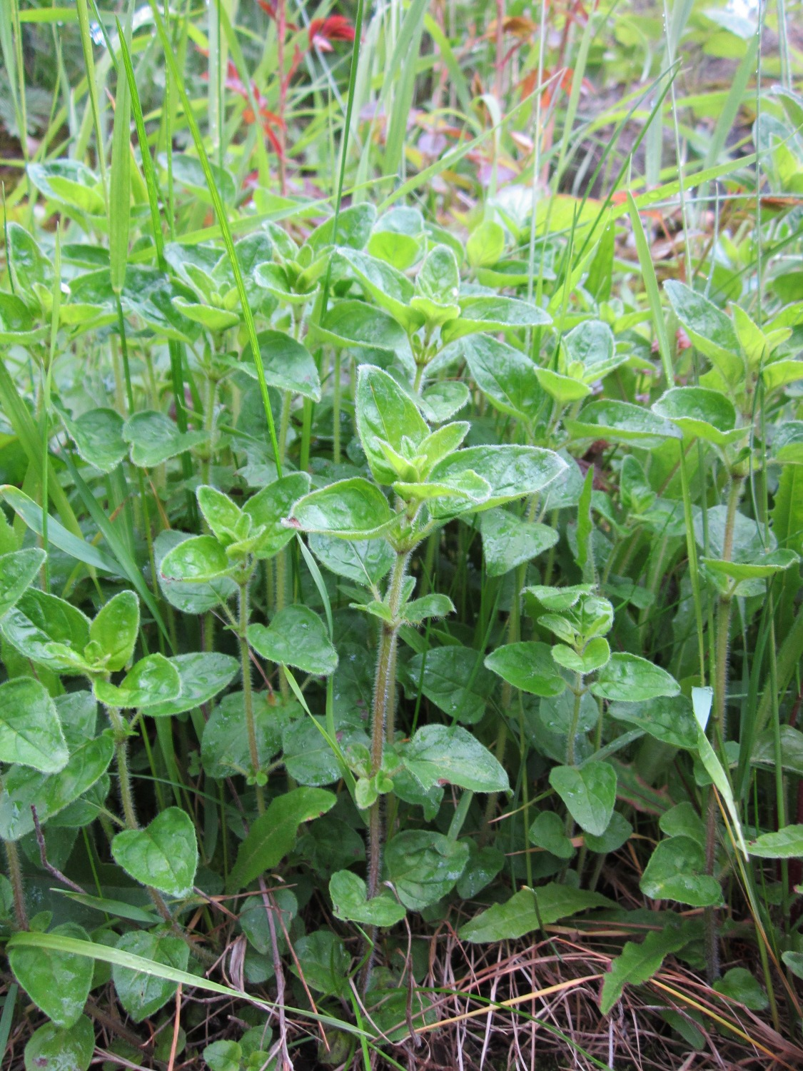 Oregano (Origanum vulgare) im Bürgerpark Saarbrücken